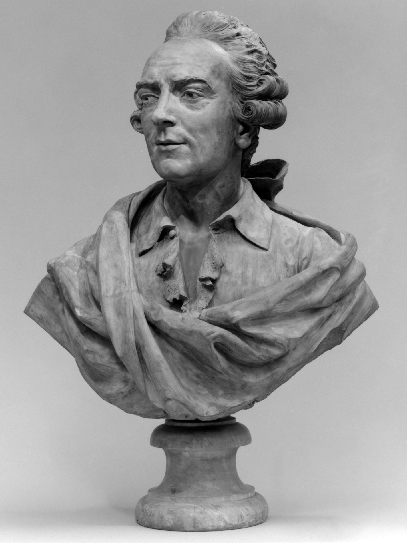 French; Bust; Sculpture